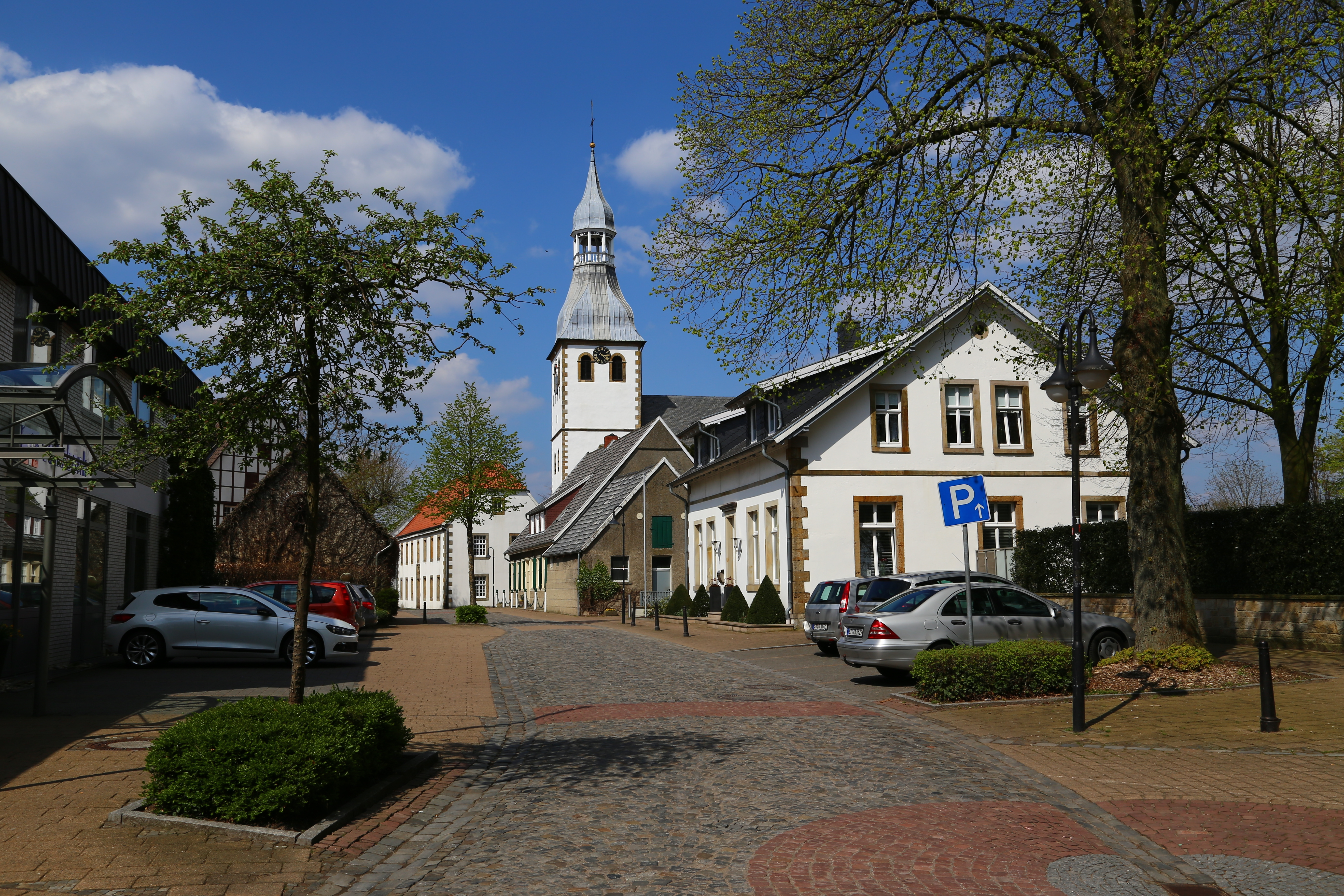 Die mit Kopfstein gepflasterte Brenninkmeyerstraße im Ortskern von Hopsten, Kreis Steinfurt, Nordrhein-Westfalen, Deutschland. Im Hintergrund ragt der Turm der Pfarrkirche St. Georg auf. This is a photograph of an architectural monument.